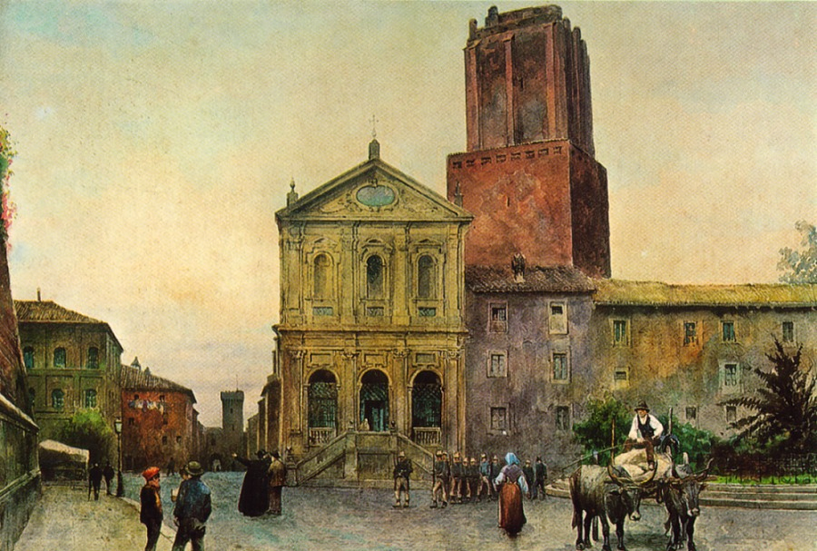 Torre delle Milizie e Santa Caterina da Siena in Rome (rione Monti)